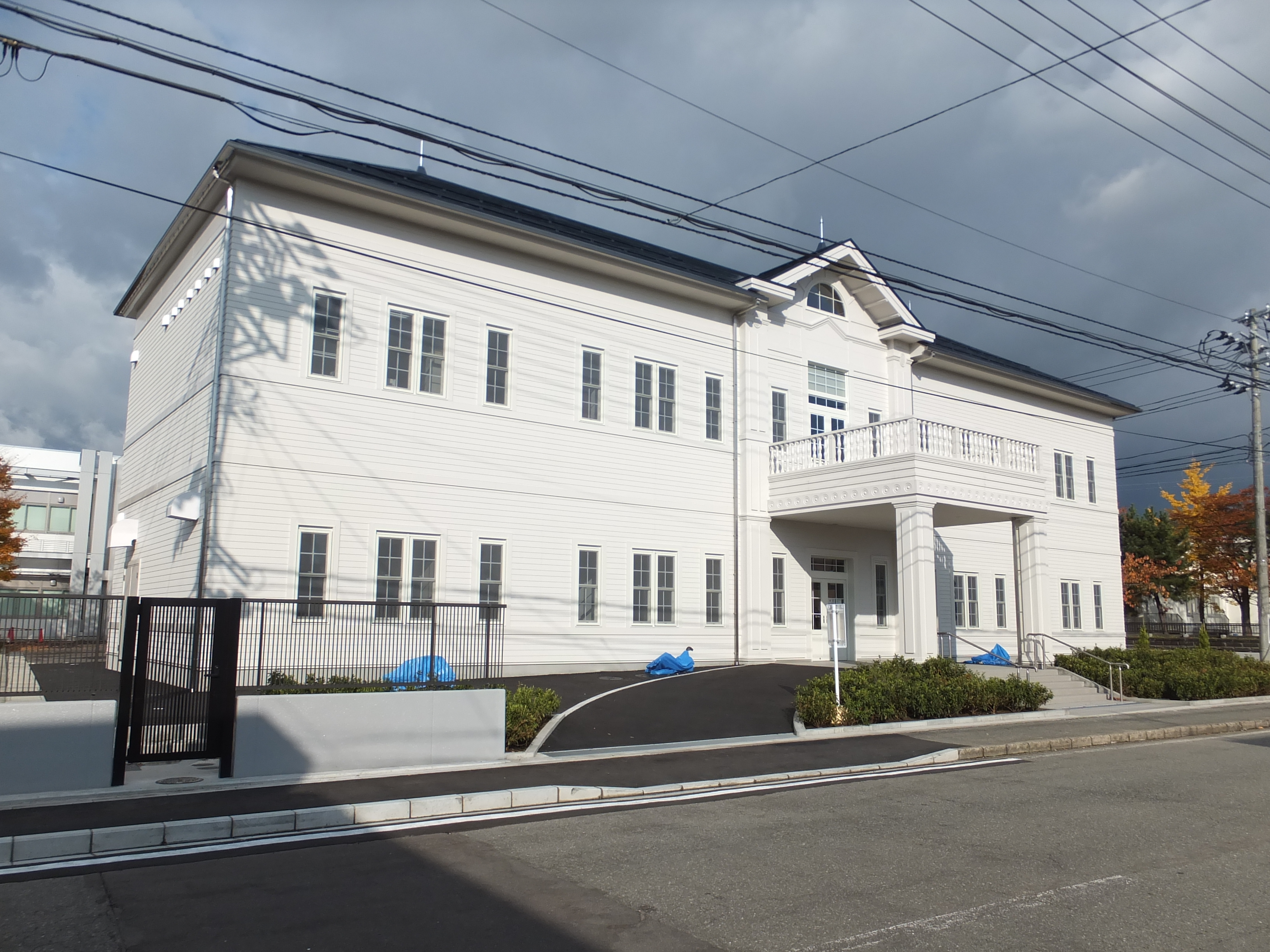 秋田大学百周年記念館。旧秋田鉱山専門学校本館の建物外観を模して2012年10月に竣工した。ベンチャーインキュベーションセンターに隣接する。 Fujifilm FinePix F770EXR